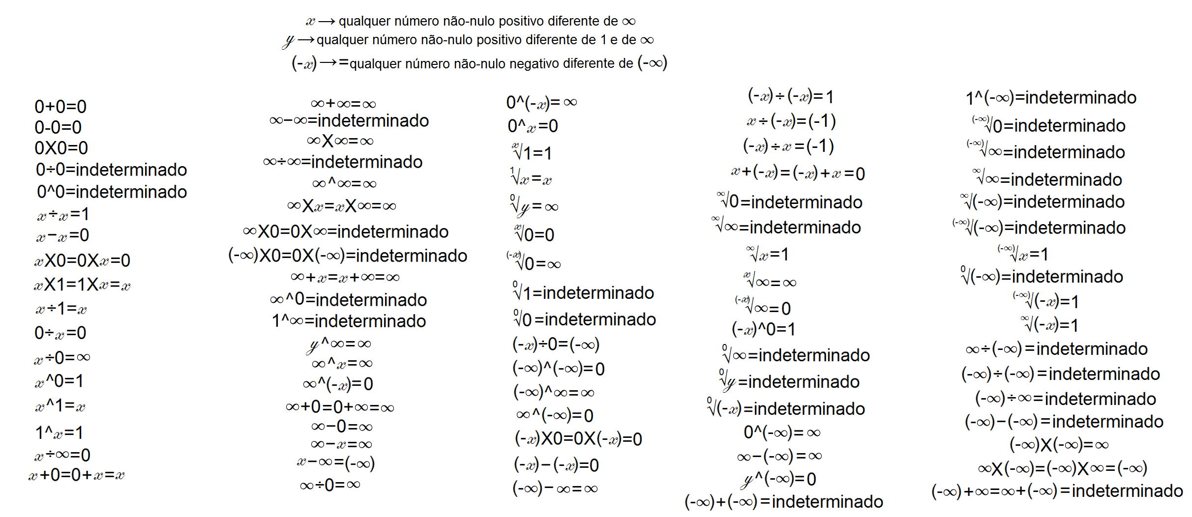 Algumas regras da matemática